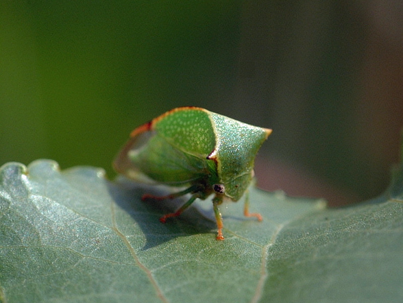 Büffelzikade, Stictocephala bisonia, Darmstadt, Truppenübungsplatz, Deutschland